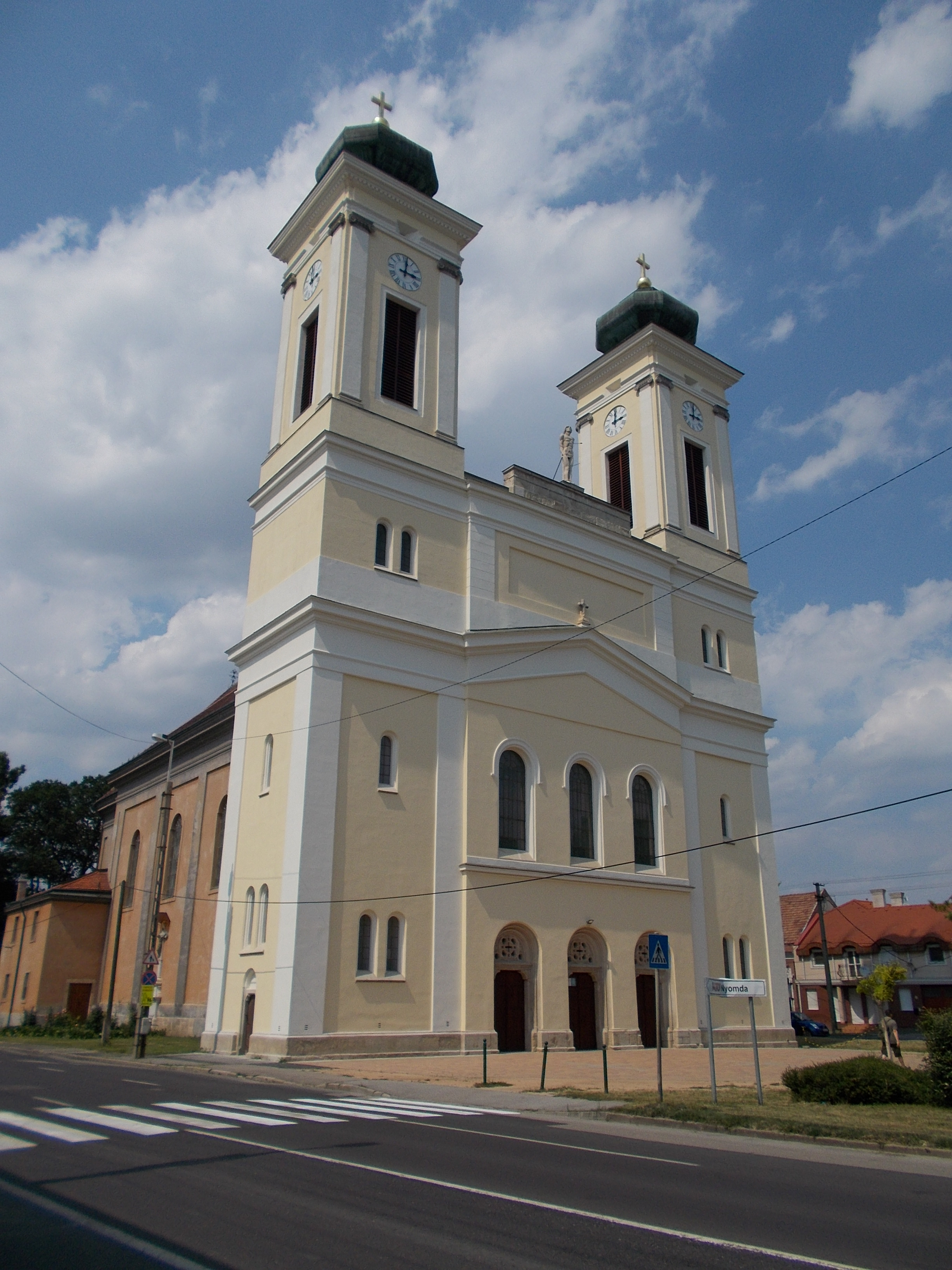 Felsővárosi római katolikus (Szt. Sebestyén) plébániatemplom. Műemlék ID 3868. Barokk eredetű. - Magyarország, Fejér megye, Székesfehérvár, Móri utca This is a photo of a monument in Hungary. Identifier: 3868